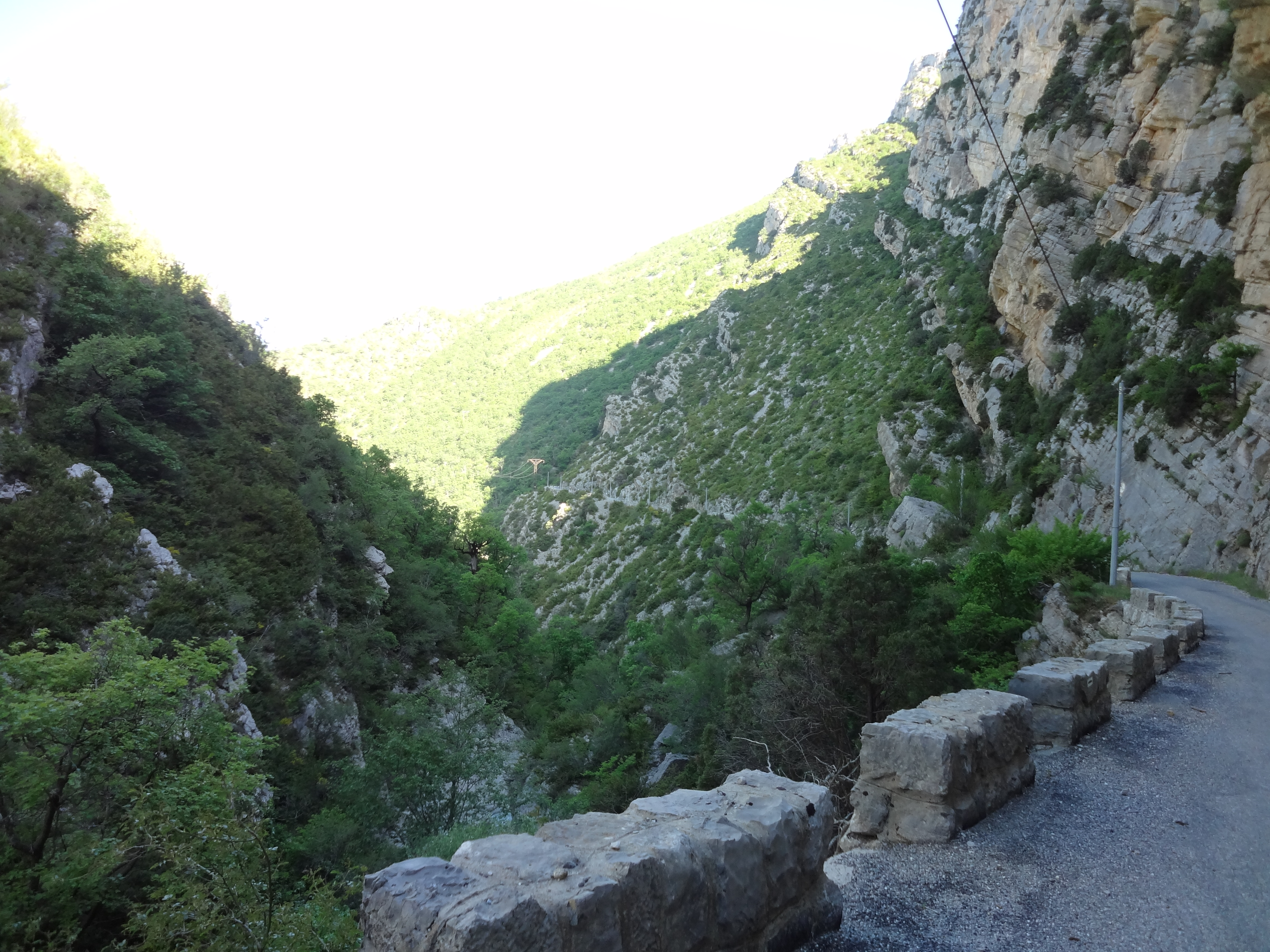 D 17 à Beynes, au passage de la cluse du Pas d’Escale